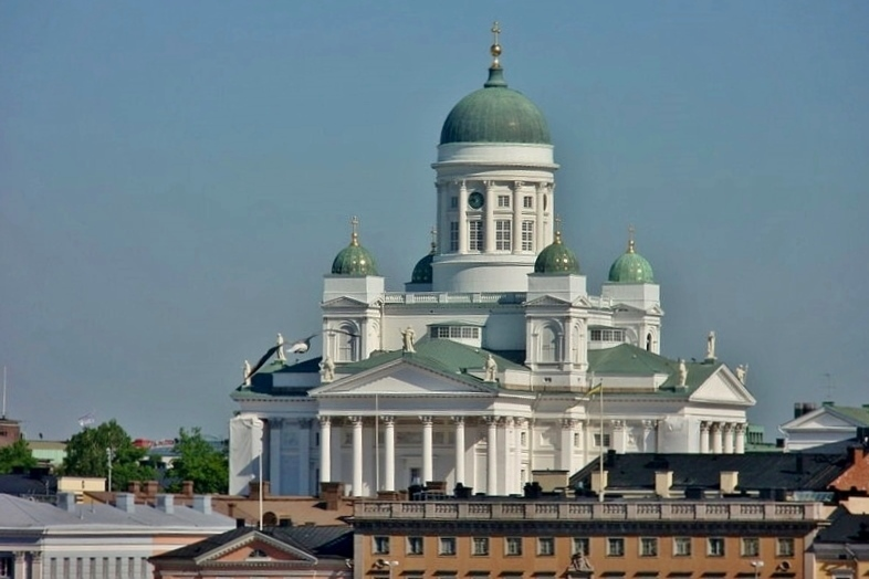 Helsingin tuomiokirkko. Kuva on otettu Tähtitorninmäeltä.